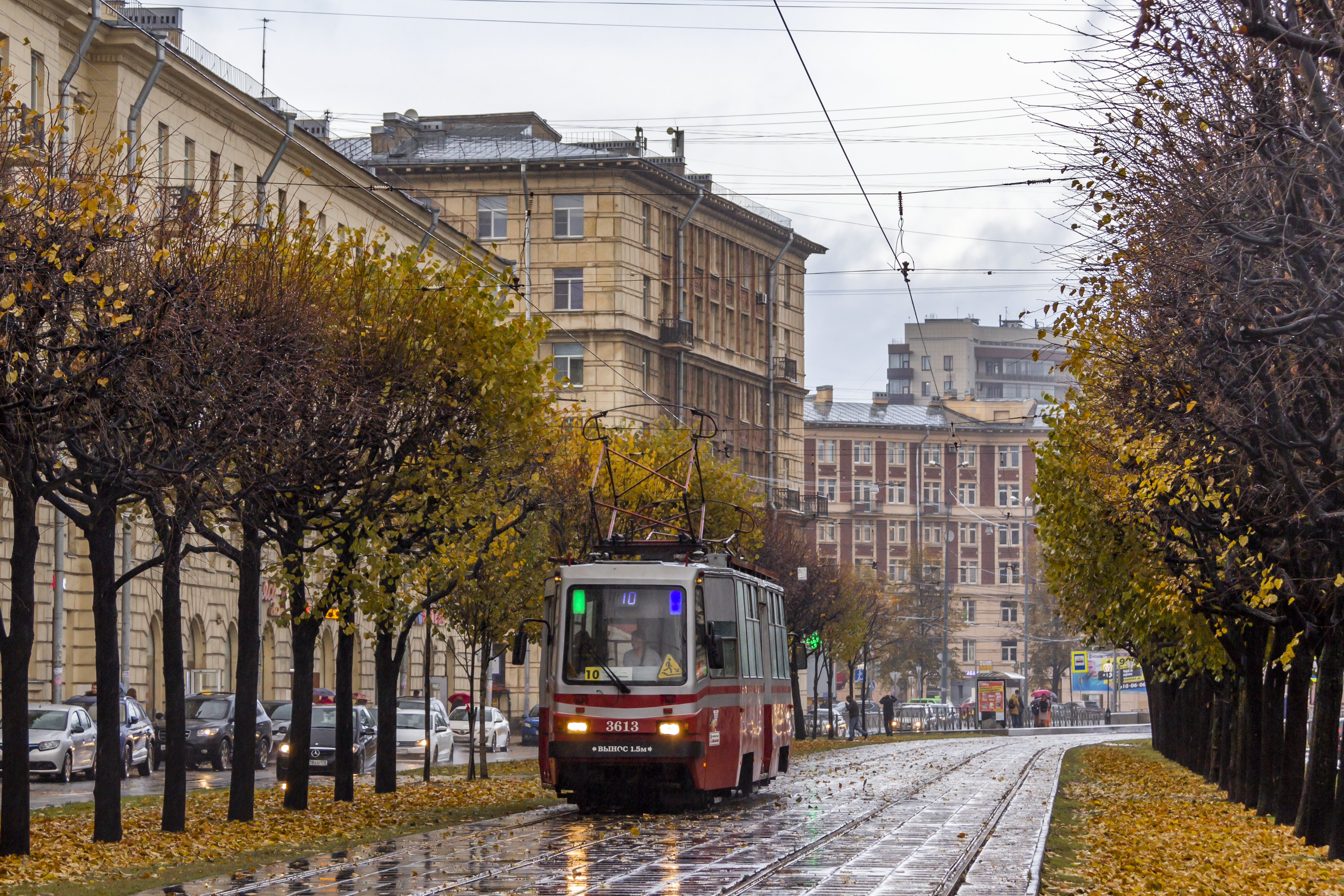 Вагон ПР с бортовым номером 3613 прошедший капитальный ремонт, в последствии переоборудован из служебного в пассажирский. В ходе КР была врезана четвёртая дверь по центру, аналогично вагонам 71-88.